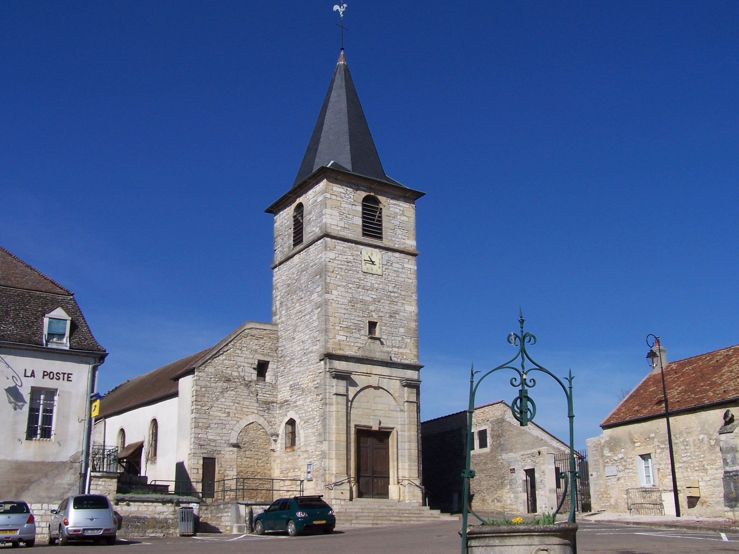 église de VOSNE ROMANEE 21